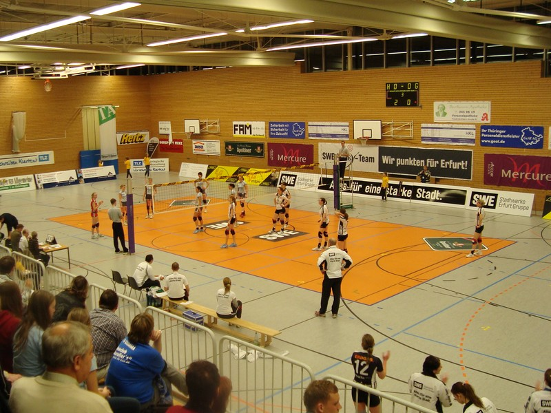 SWE Volley-Team im Heimspiel gegen Grimma